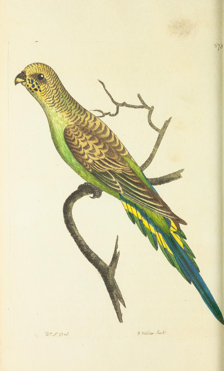 Fist-ever depiction of Melopsittacus undulatus. Colour plate no 673, attached to the first description.